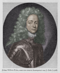 Imagen de Juan Guillermo Friso